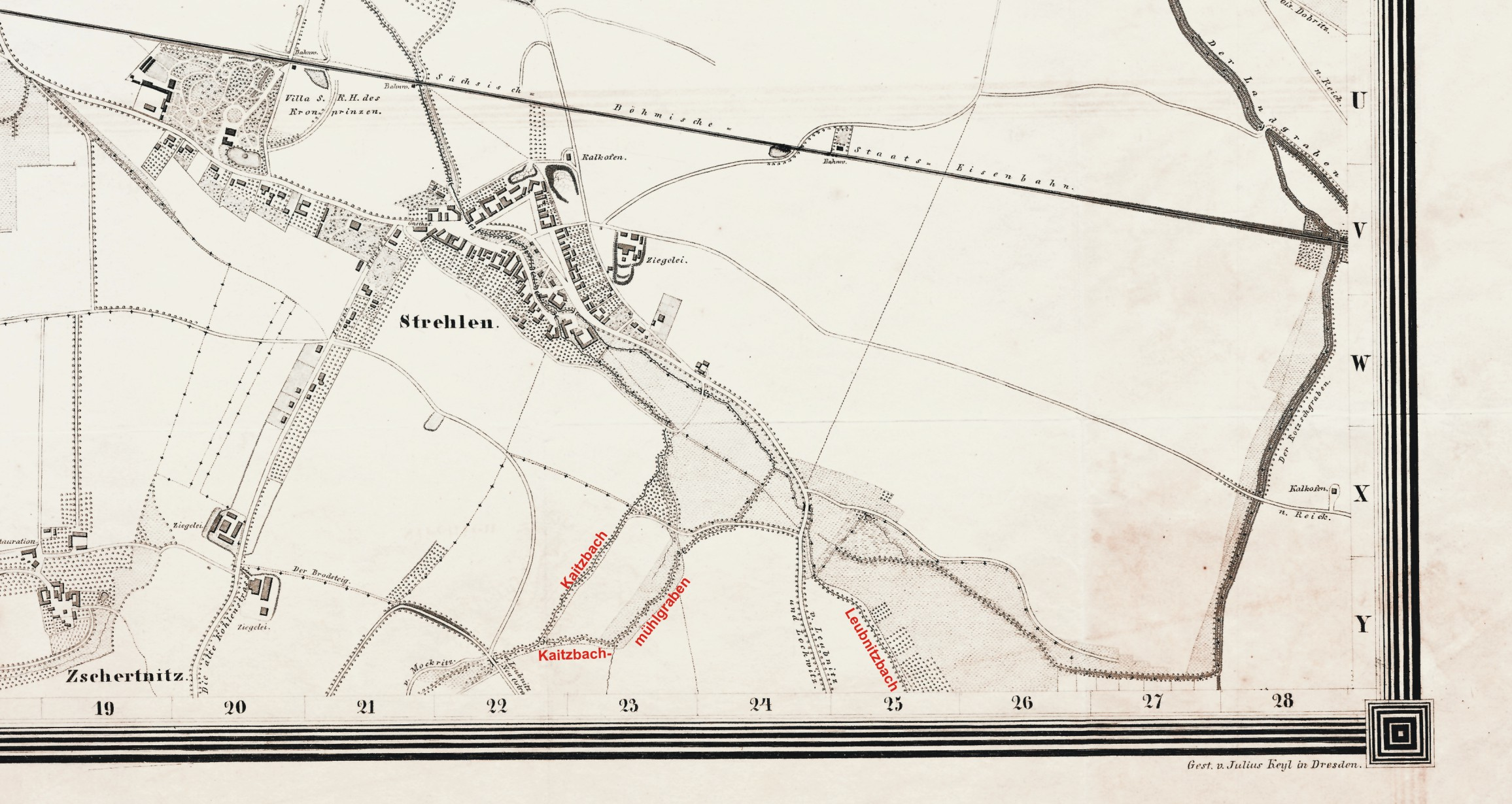 Plan von Dresden (1863) Ausschnitt der Gegend um das Dorf Strehlen, Zuflüsse des Kaitzbaches, Kaitzbachmühlgrabens und des Leubnitzbaches (rote Beschriftung vom Uploader eingesetzt, nach Angaben auf offiziellem Stadtplan Dresdens von 1912)